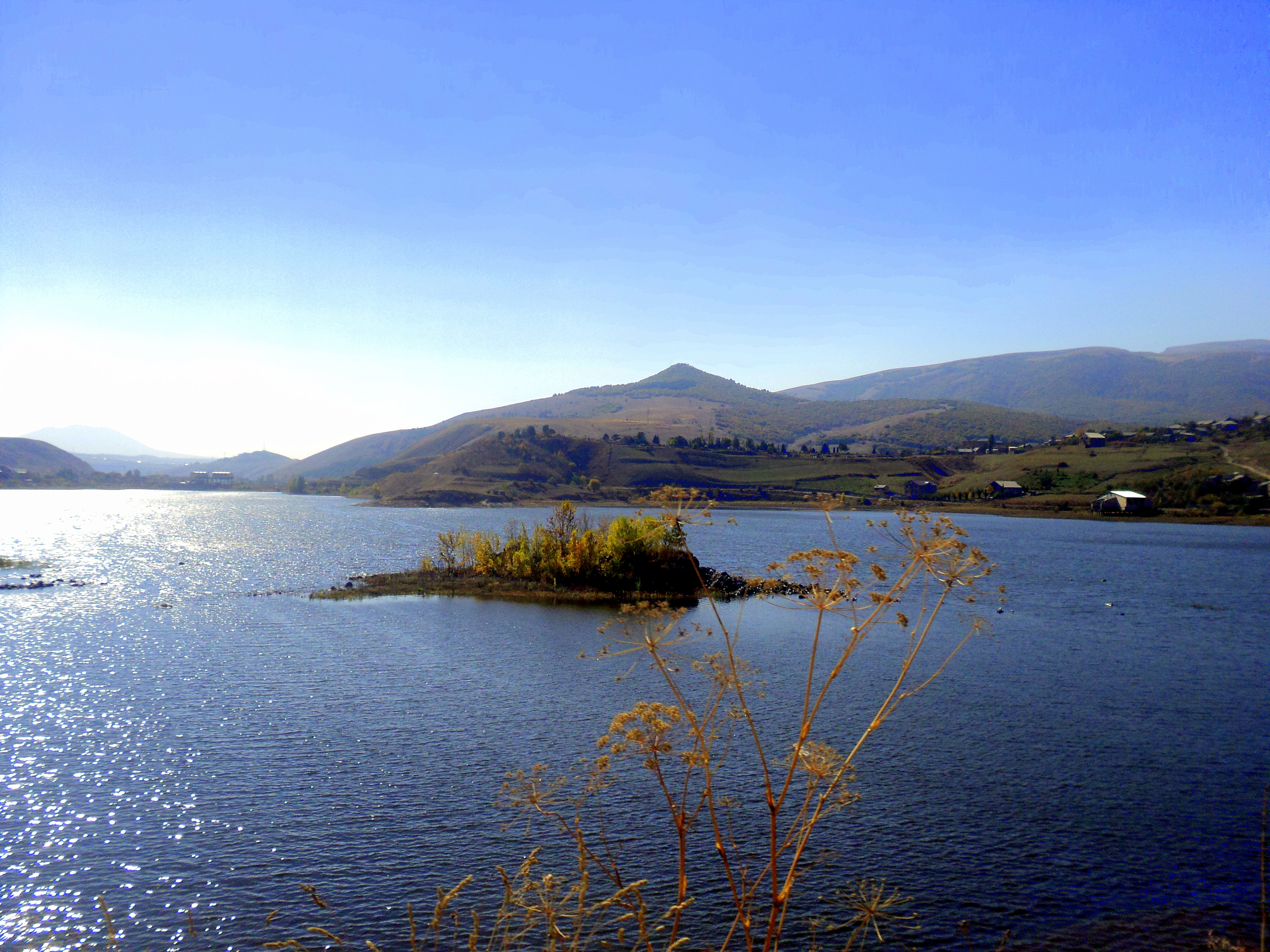 Հրազդան Ջրամբար